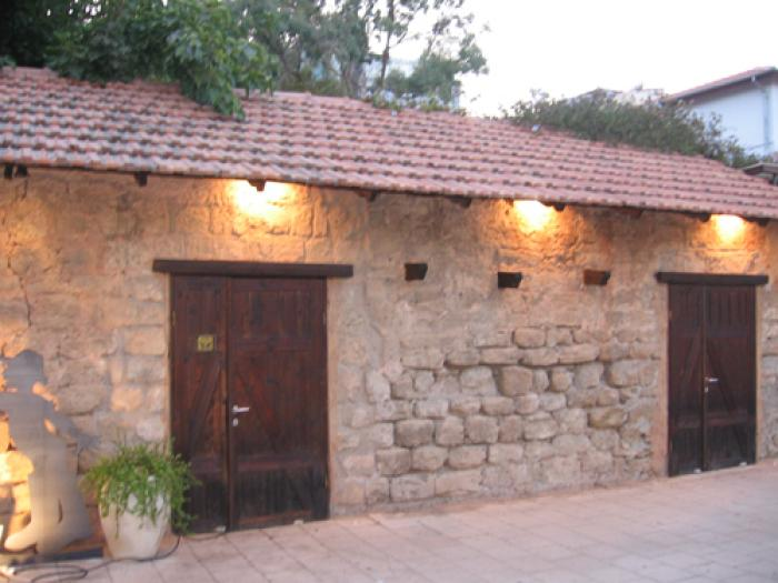 אורווה מ-1884 של המיסד אליעזר אלחנן שליט הוסבה למוזיאון תחבורה.